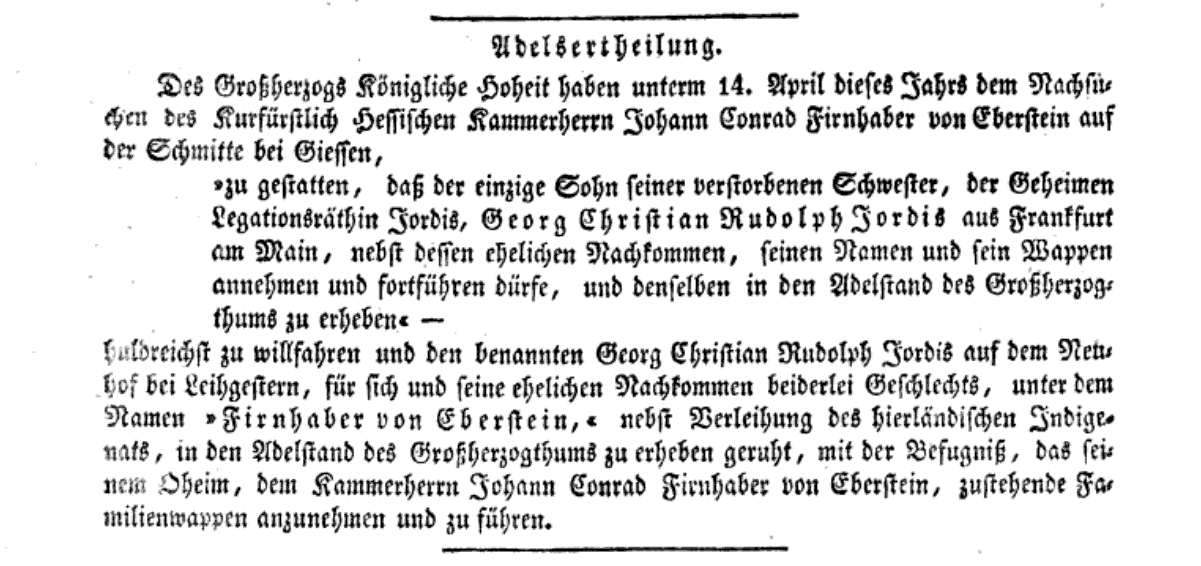 Verkündigung der Adelserteilung an den kognatischen Neffen des Johann Conrad Freiherr Firnhaber von Eberstein (* 22. September 1776 in Rüsselsheim; † 4. Juni 1849), hessischer Politiker und ehemaliger Abgeordneter der 2. Kammer der Landstände des Großherzogtums Hessen.